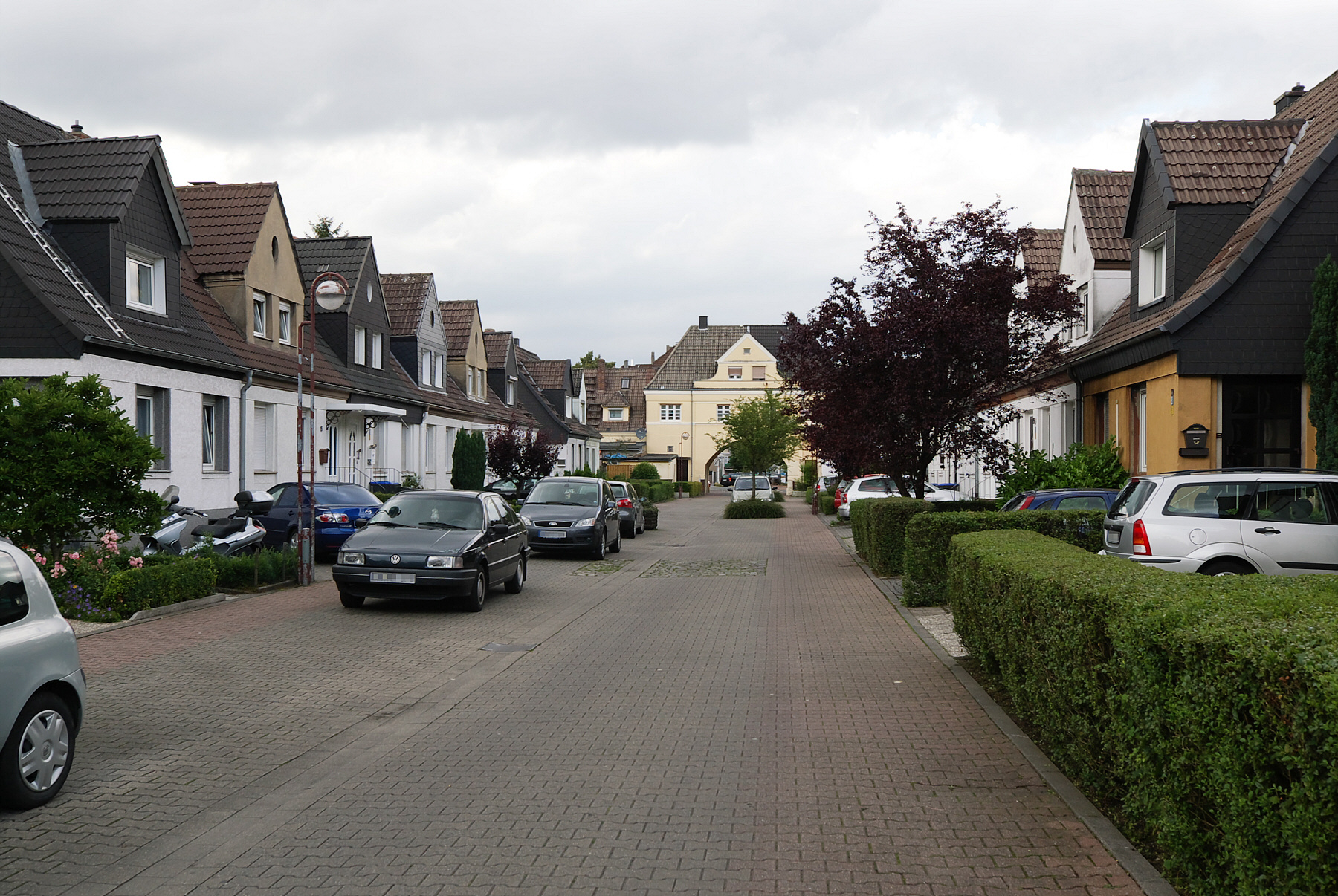 "Siedlung am Kanal", Arbeitersiedlung in Lünen, Nordrhein-Westfalen. Teil der Route der Industriekultur. Kösterstraße.